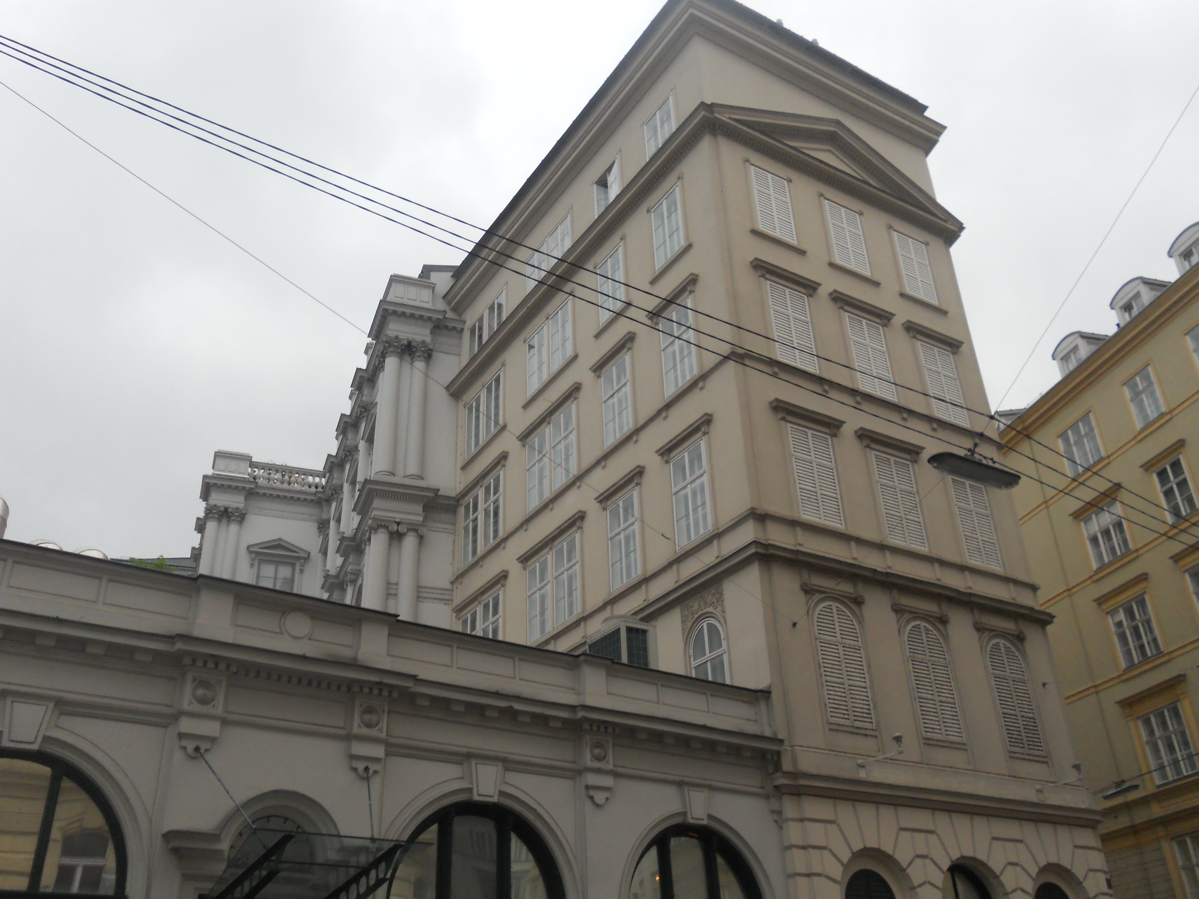 Coburgbastei und Wohnhaus